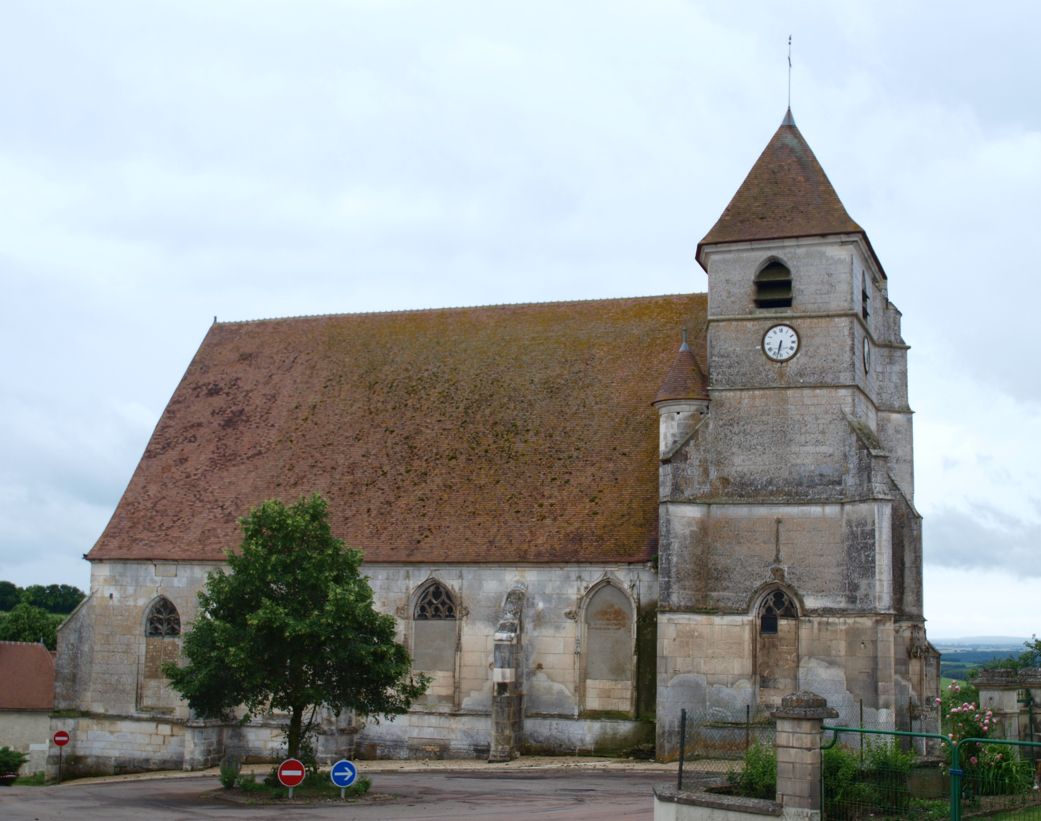 Taingy (Yonne, France) ; église